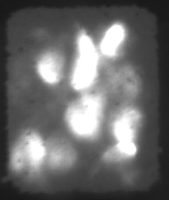 Nahaufnahme (schwarz/weiss) eines Pixeles einer FED-Anzeige